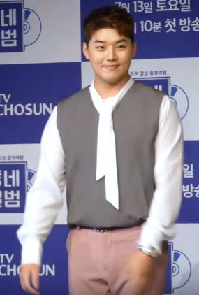 9일 오후 서울시 영등포구 여의도 서울마리나에서 TV조선 '동네앨범' 제작발표회가 열려 가수 KCM, 권혁수가 참석해 포토타임을 갖고 있다.